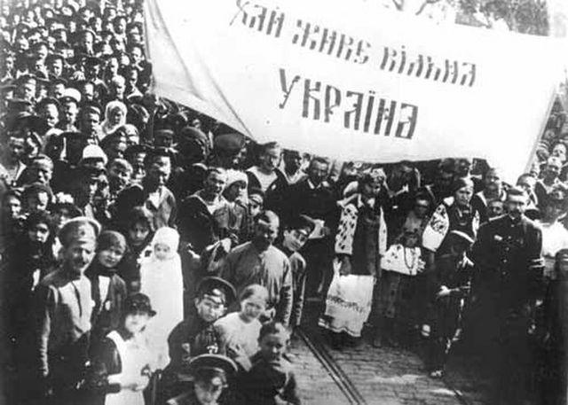 Демонстрація у Києві з нагоди гетьманського перевороту. Напис на розтяжці: "Хай живе вільна Україна".